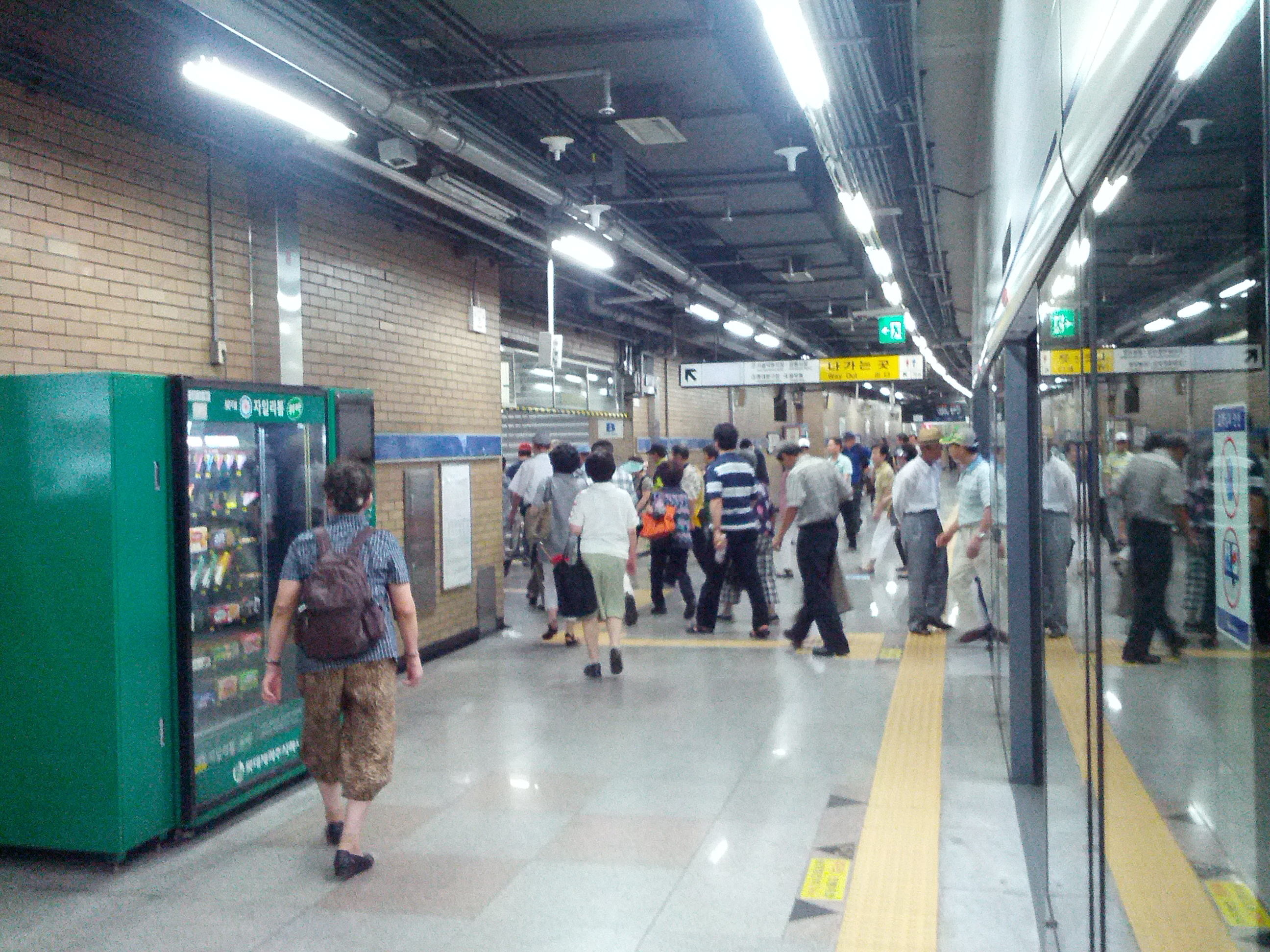 제기동역 승강장